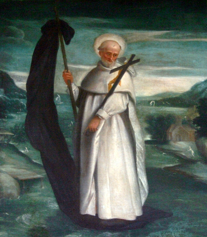 Beato Venturino da Bergamo